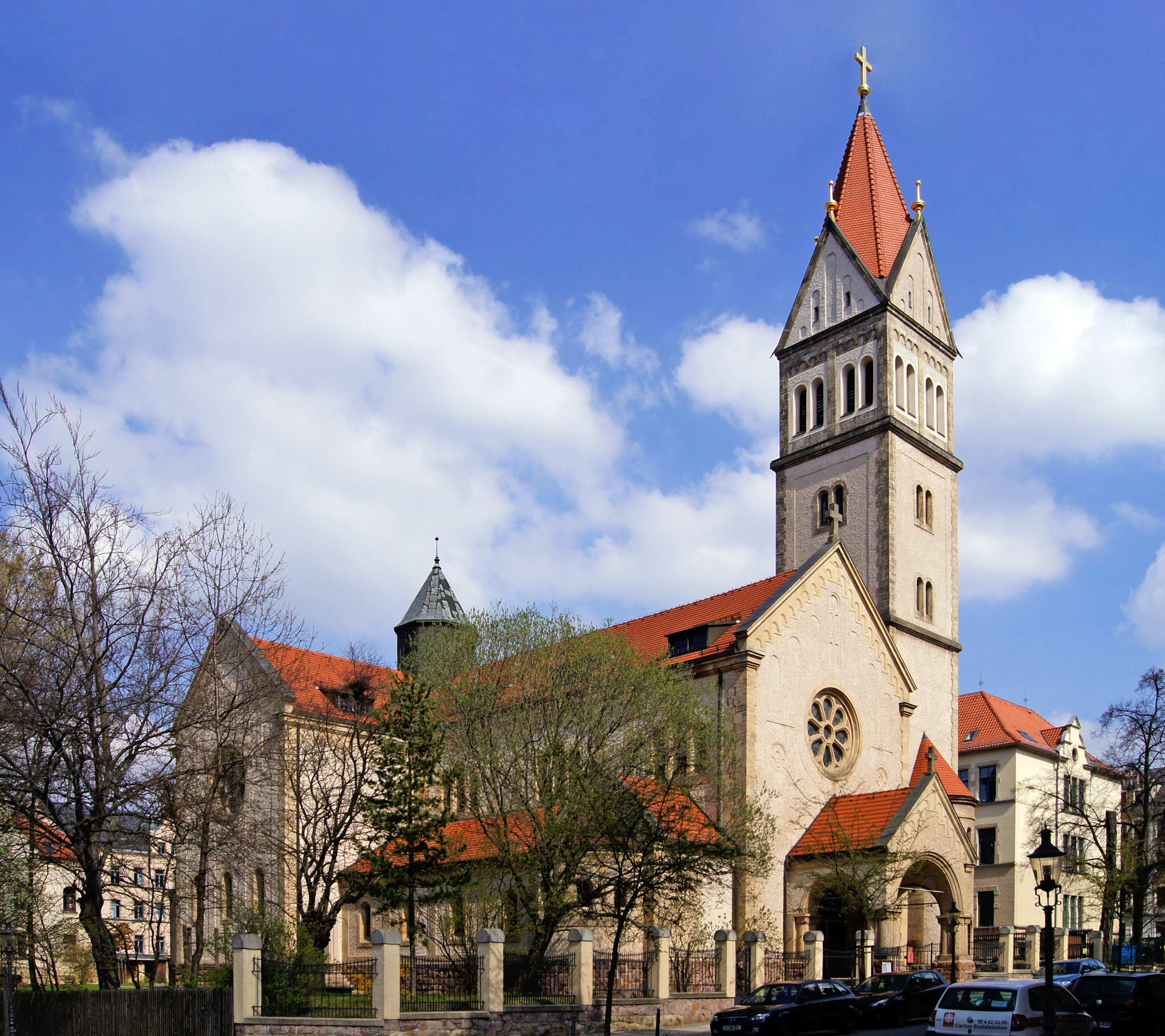 Katholische Pfarrkirche St. Joseph in Chemnitz (Sonnenberg), Sicht aus Südwesten (Markusstraße / Ludwig-Kirsch-Straße), im April 2012. Unknown